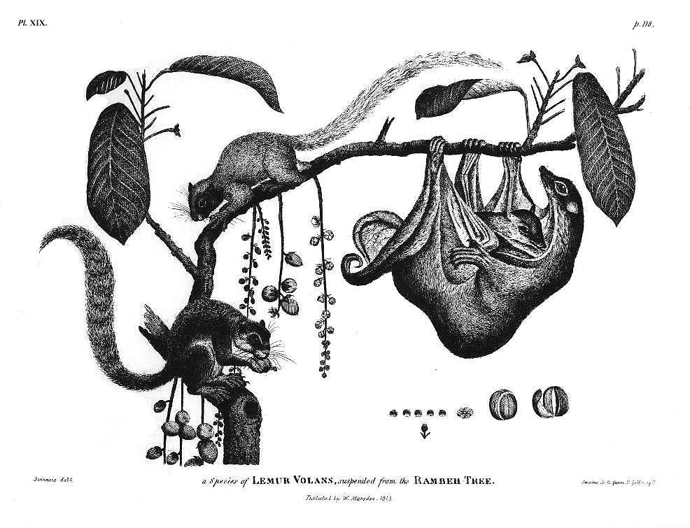 William Marsden: The History of Sumatra. Tafel XVIII: Lemur volants